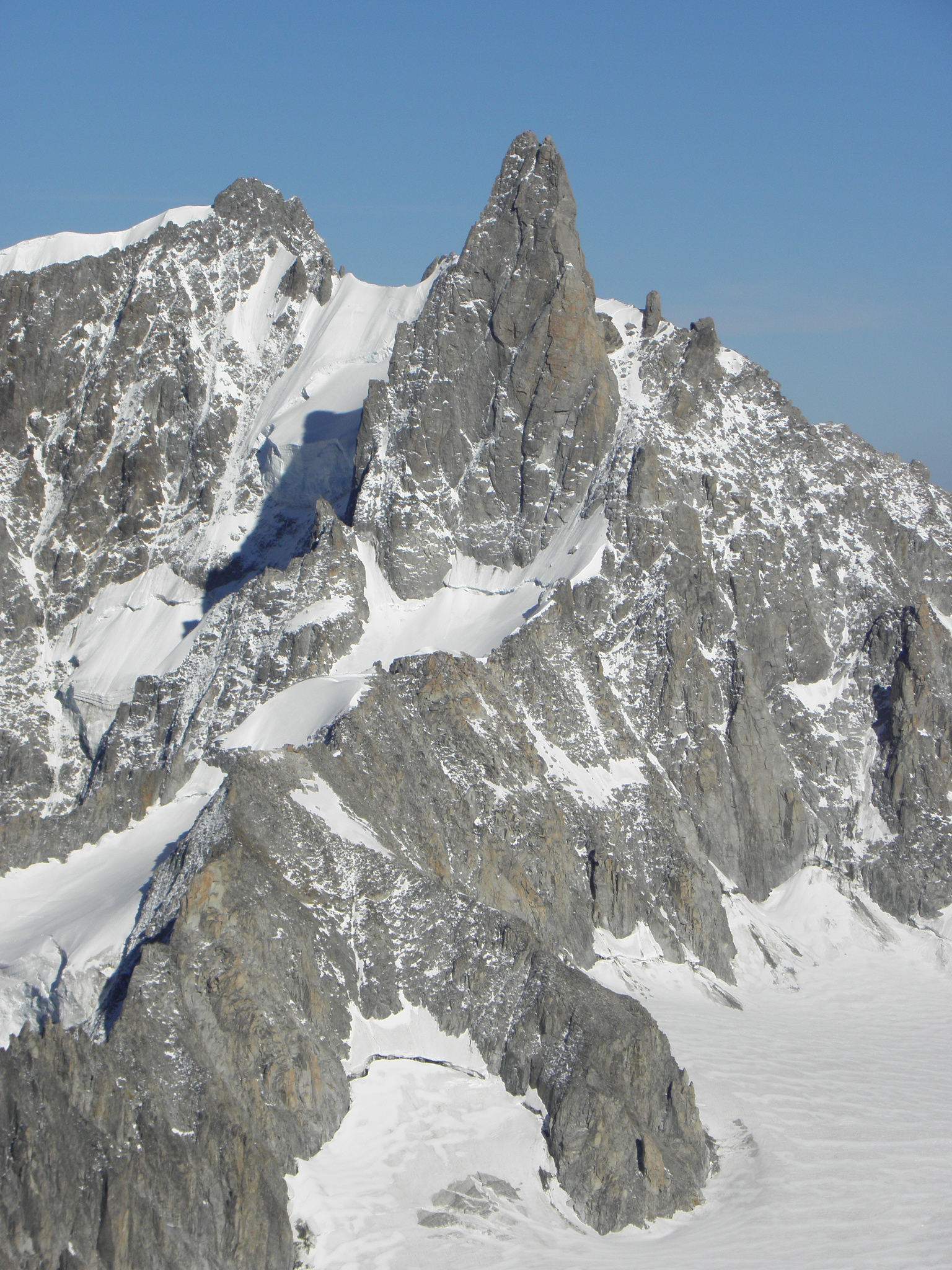 Dent du Géant, gesehen vom Gipfel der Aiguille du Midi.